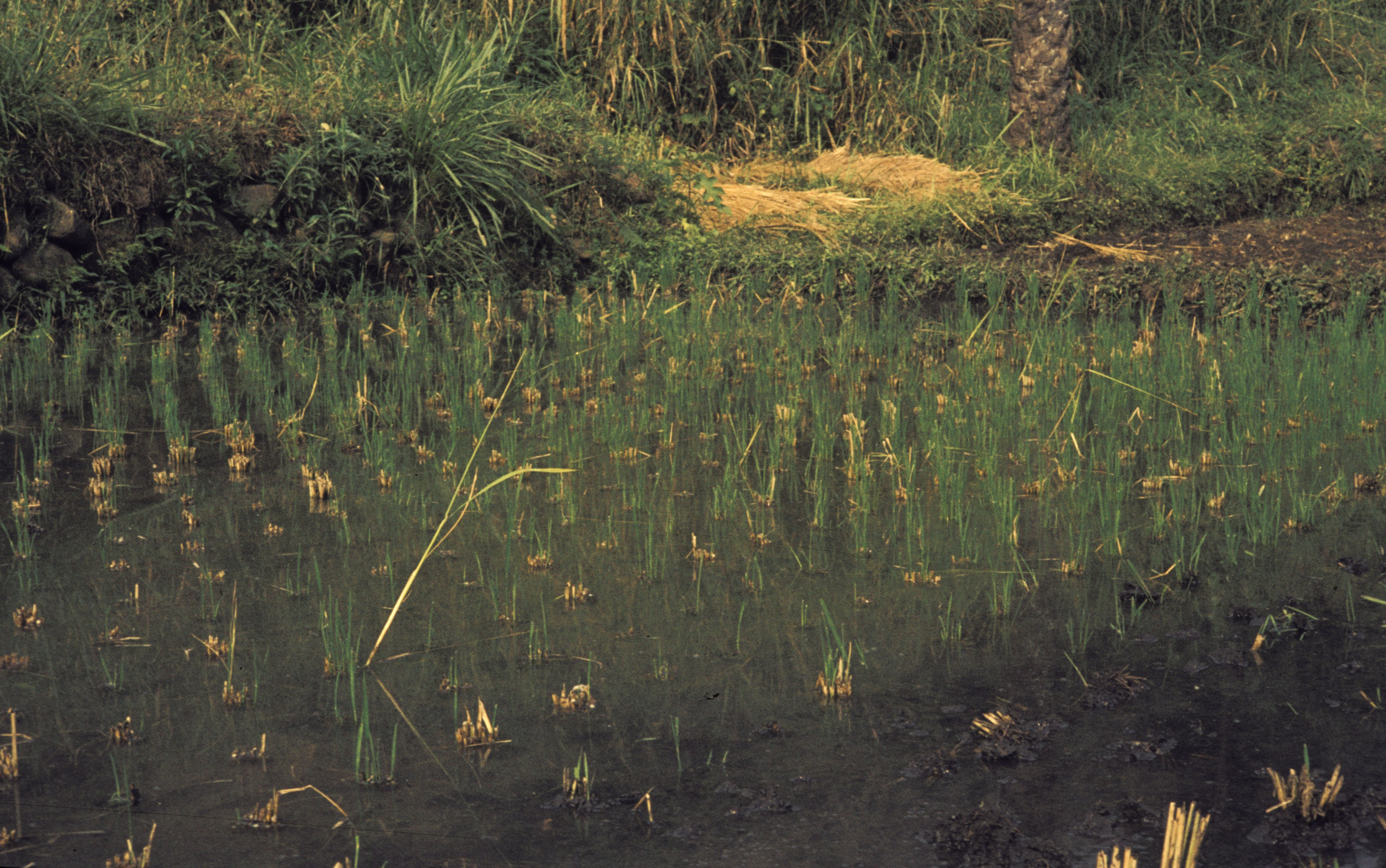 Cameroon